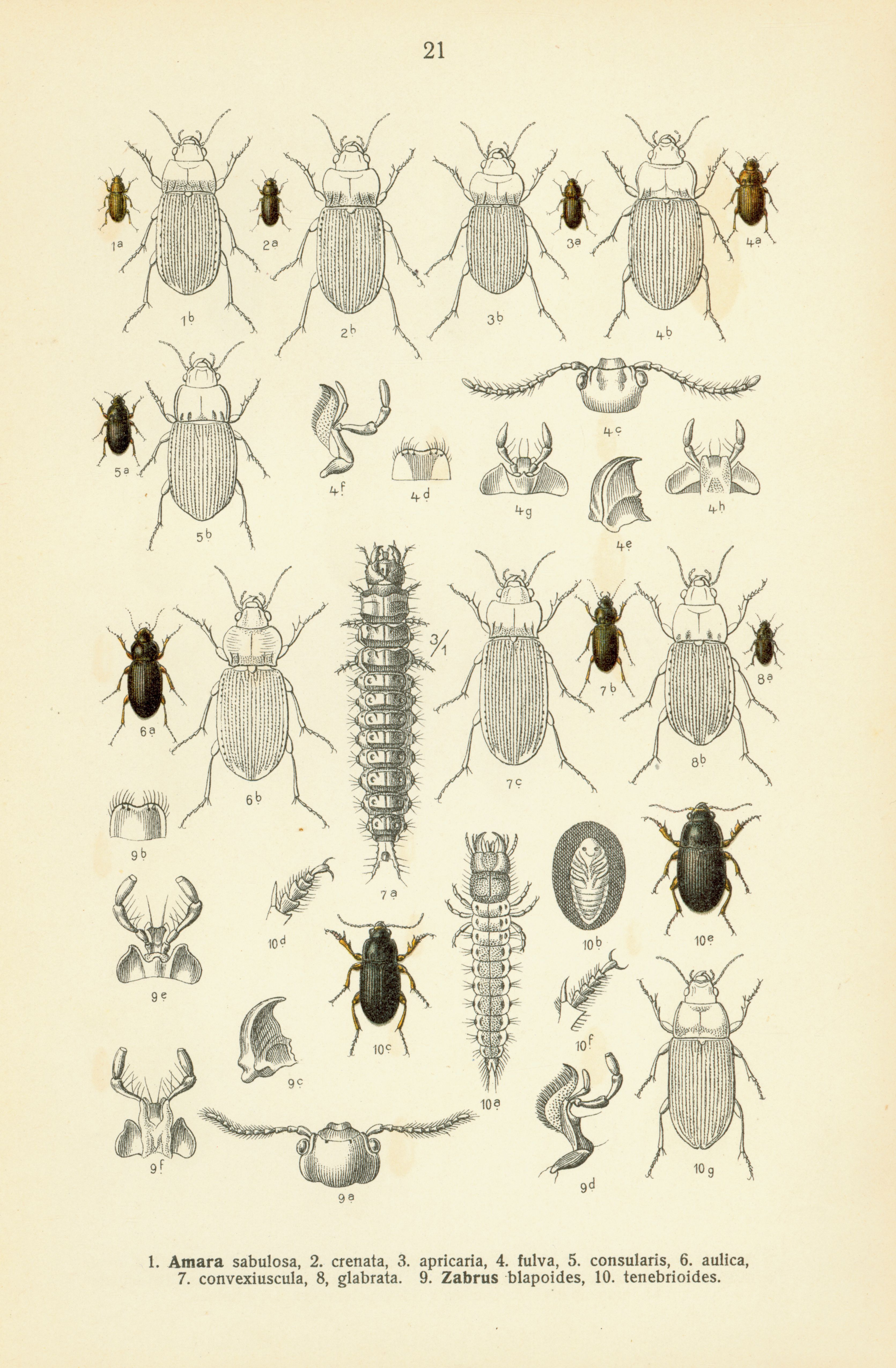 See image for index to numbers. Amara sabulosa Serv. = Amara sabulosa (Audinet-Serville, 1821) (1a: adult, dorsal view, 1b: adult, upperside pattern) [Amara] crenata Dej. = Amara crenata Dejean, 1828 (2a: adult, dorsal view, 2b: adult, upperside pattern) [Amara] apricaria Payk. = Amara apricaria (Paykull, 1790) (3a: adult, dorsal view, 3b: adult, upperside pattern) [Amara] fulva De Geer. = Amara fulva (O.F.Müller 1776) (4a: adult, dorsal view, 4b: adult, upperside pattern, 4c: head, dorsal view, 4d: labrum, 4e: mandible, 4f: maxilla, 4g: labium, ventral view, 4h: labium, dorsal view) [Amara] consularis Duftsch. = Amara consularis (Duftschmid, 1812) (5a: adult, dorsal view, 5b: adult, upperside pattern) [Amara] aulica Panz. = Amara aulica (Panzer, 1797) (6a: adult, dorsal view, 6b: adult, upperside pattern) [Amara] convexiuscula Mrsh. = Amara convexiuscula (Marsham, 1802) (7a: larva, dorsal view, 7b: adult, dorsal view, 7c: adult, upperside pattern) [Amara] glabrata Dej. = Amara glabrata Dejean, 1828 (8a: adult, dorsal view, 8b: adult, upperside pattern) Zabrus blapoides Creutz. = Zabrus spinipes (Fabricius, 1798) (9a: head, dorsal view, 9b: labrum, 9c: mandible, 9d: maxilla, 9e: labium, ventral view, 9f: labium, dorsal view) [Zabrus] tenebrioides Goeze. = Zabrus tenebrioides (Goeze, 1777) (10a: larva, dorsal view, 10b: pupa, ventral view, 10c: adult male, dorsal view, 10d: adult male, tarsus, 10e: adult female, dorsal view, 10f: adult female, tarsus, 10g: adult female, upperside pattern)